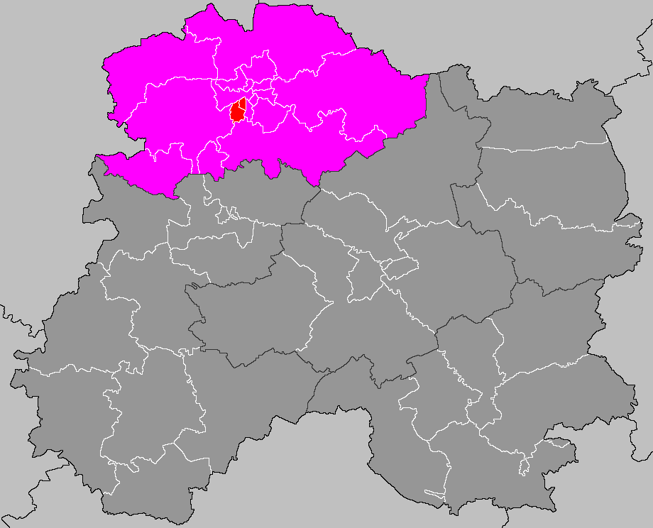 Localisation du canton de Reims-5